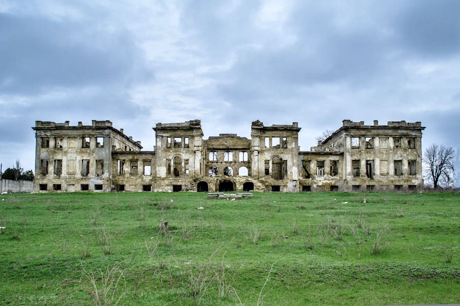 Садиба Дубицького, с. Василівка